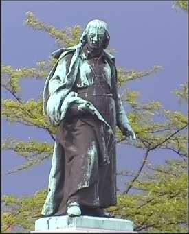 Valentin Vodnik